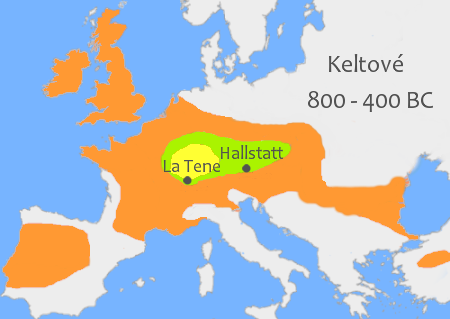 Celtes 800 - 400 BC